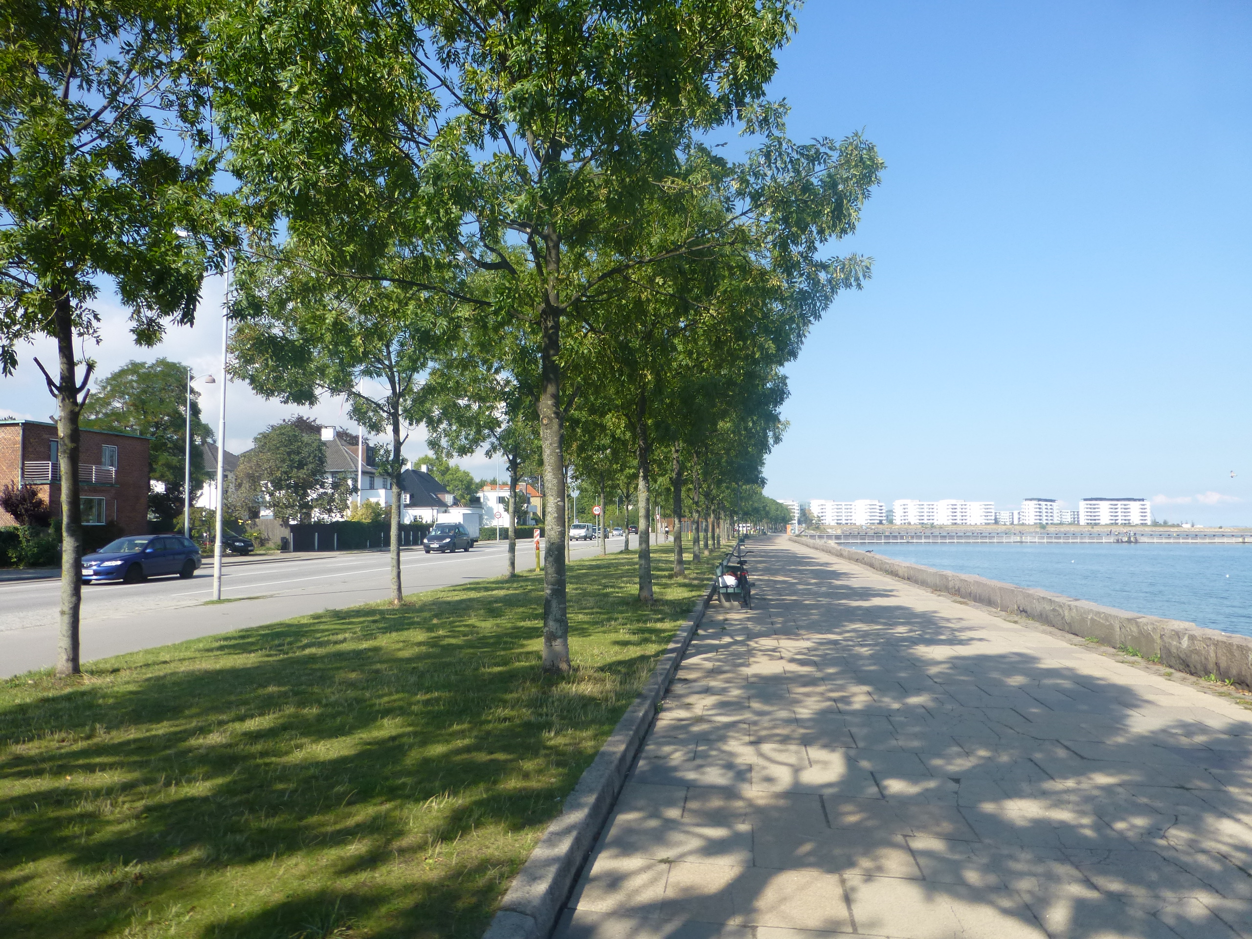 The street Strandpromenaden in Østerbro in Copenhagen.